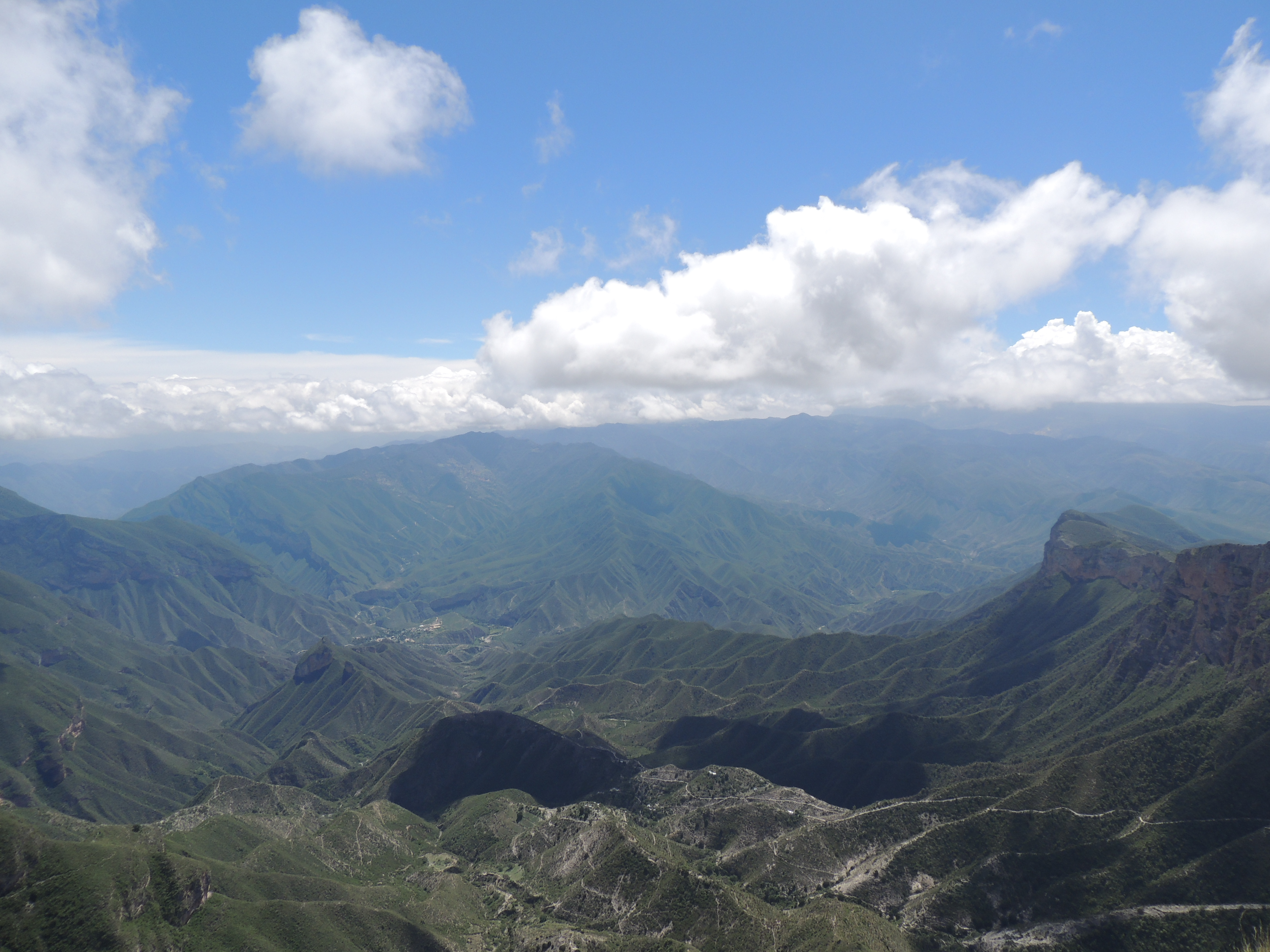 Vista panorámica de la Sierra Gorda de Querétaro, al fondo se observan las poblaciones de Bucarelli y Carrecillo de Media Luna